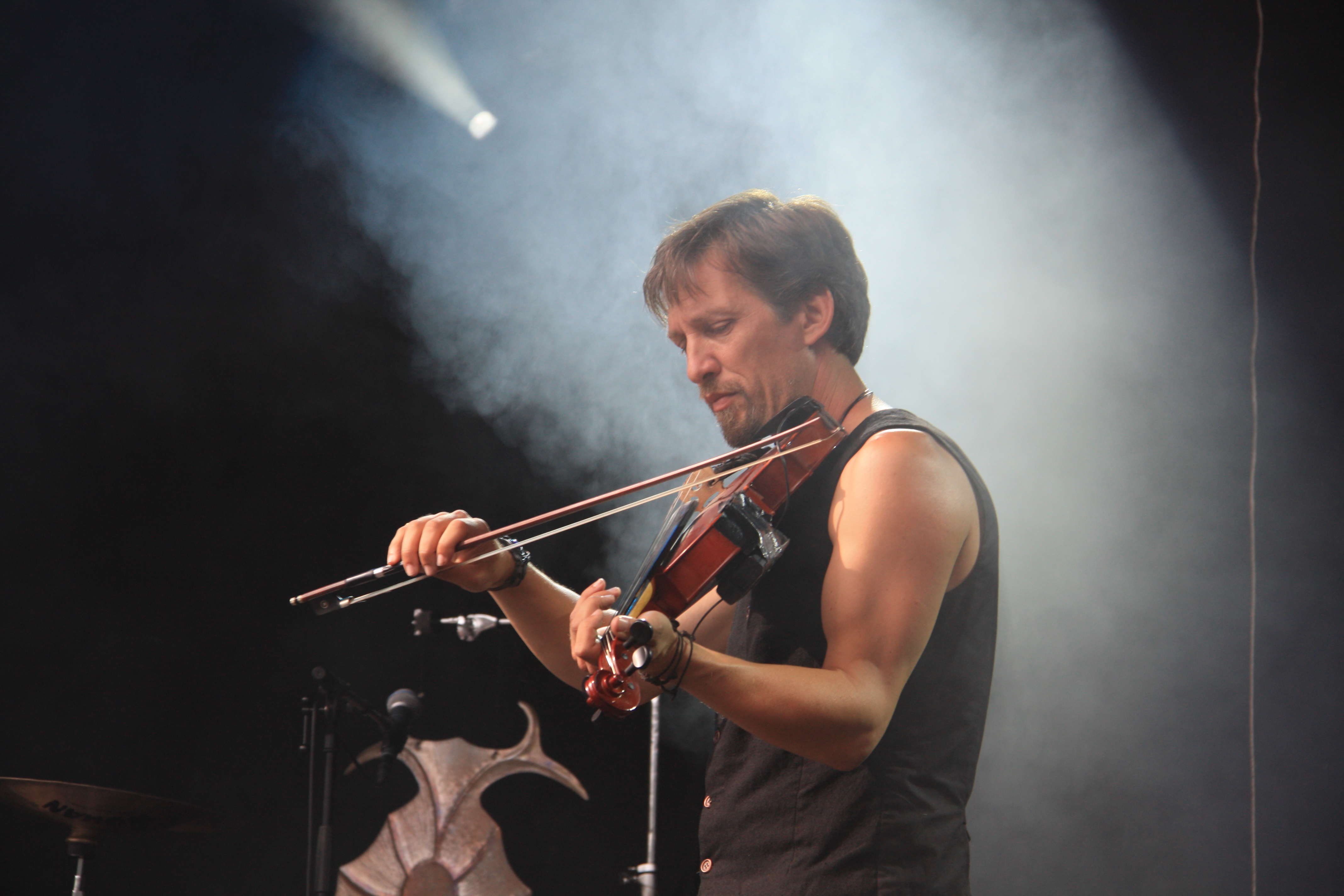 Valravn op Castlefest 2009